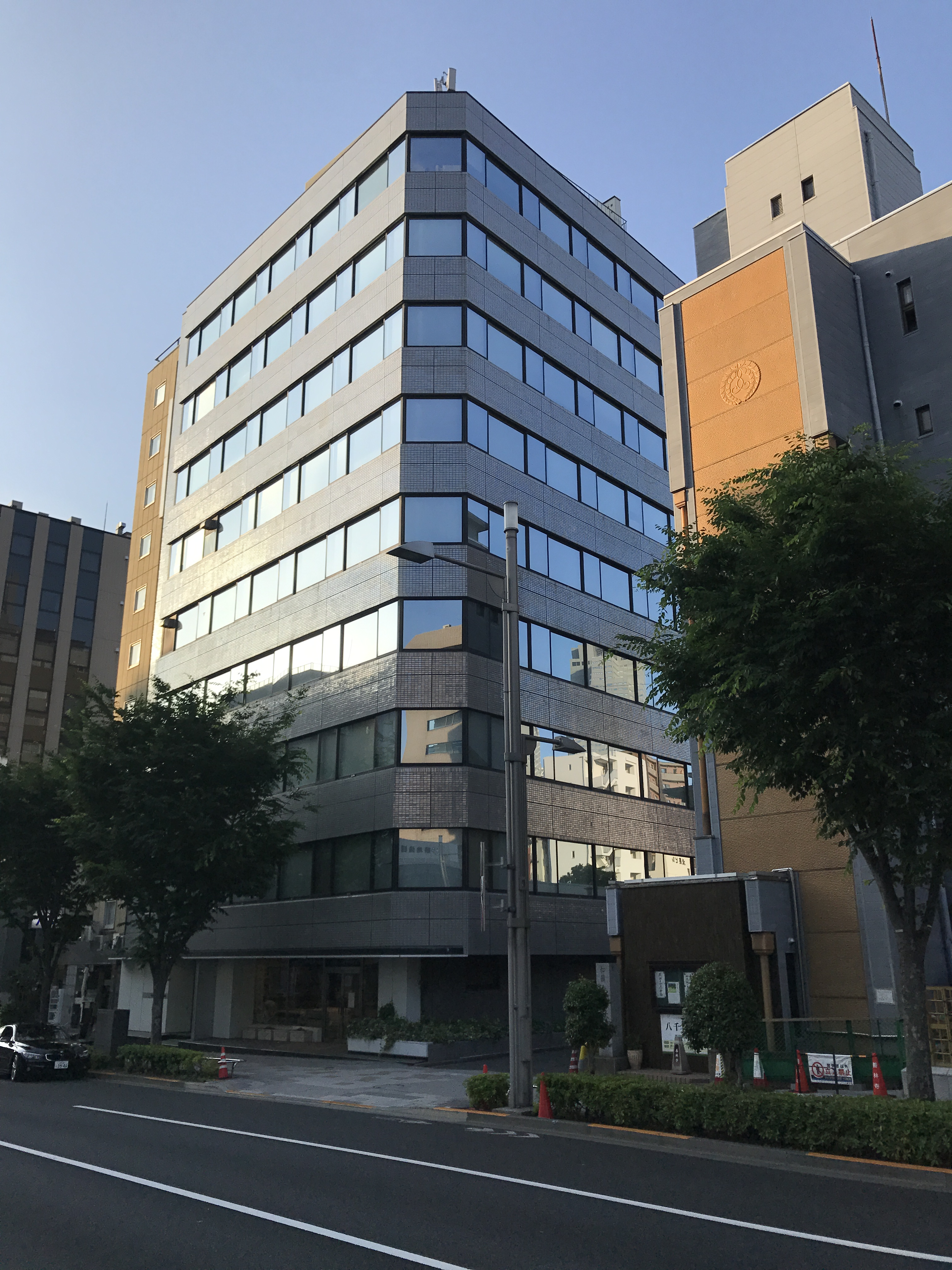 興和日東ビル。撮影（2020年6月7日）時点で、以下の事業者が入居している。File:興和日東ビル入居者.jpgも参照。 階数入居事業者 地下1階株式会社ココナツクラッシュ 1階オービーエム株式会社 2階一般社団法人サービスデザイン推進協議会 ITプロジェクトチーム商店街まちづくり事業事務局中心市街地活性化事業事務局 3階ITプロジェクトルーム 中心市街地再生事業事務局農商工連携等によるグローバルバリューチェーン構築事業事務局小売・ふるさと名物開発応援事業事務局商店街インバウンド促進支援事業事務局 4階一般社団法人日本冷凍食品協会 5階株式会社大光 6階株式会社ウィズ・ワン（受付） 7階北陸朝日放送株式会社 東京支社 8階株式会社フロイント株式会社ウィズ・ワン 9階株式会社メディア4u株式会社クレスフォート株式会社ダイアグラス